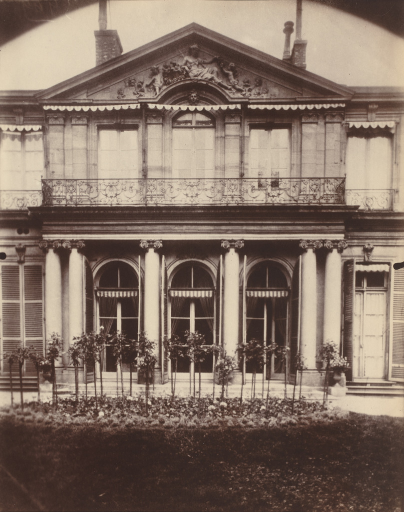 France - Paris - Facade du n°101 de la Rue de Grenelle. This building is en partie classé, en partie inscrit au titre des Monuments Historiques.